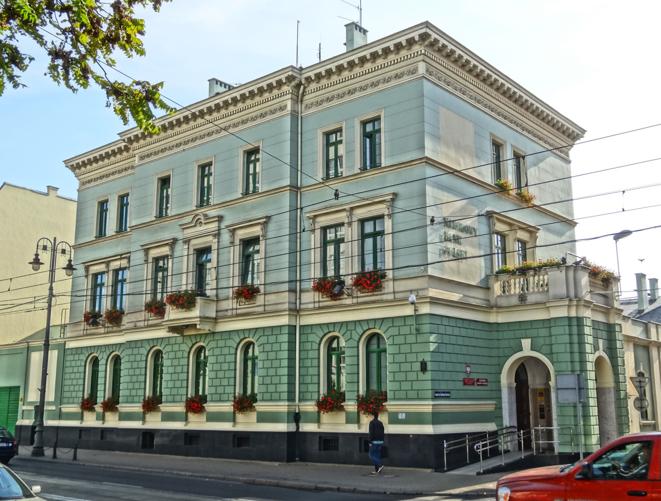 Oddział Narodowego Banku Polskiego w Bydgoszczy, Jagiellońska 8 (1863-1864)